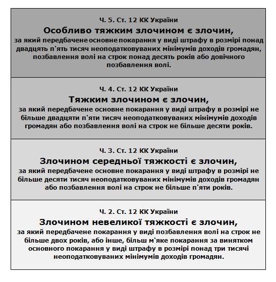 Класифікація